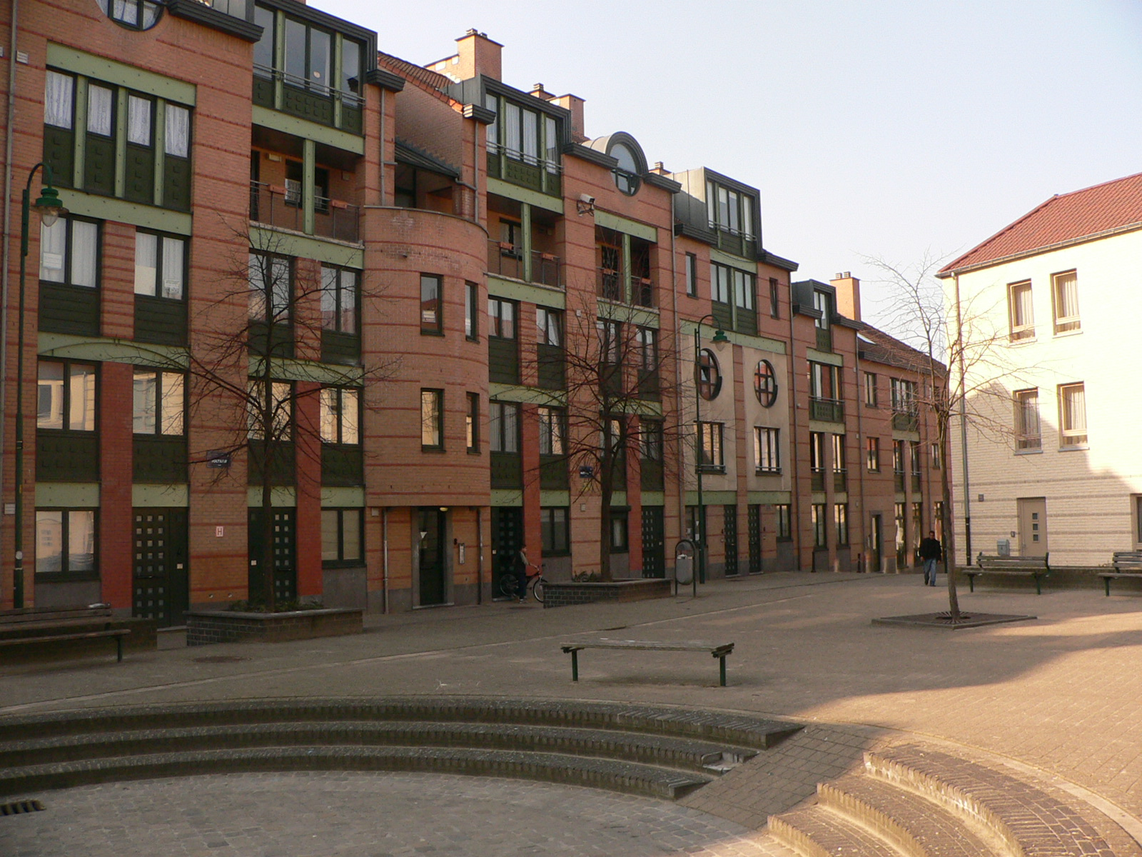 crédit documentaire Mario SCOLAS - Que je laisse en licence libre